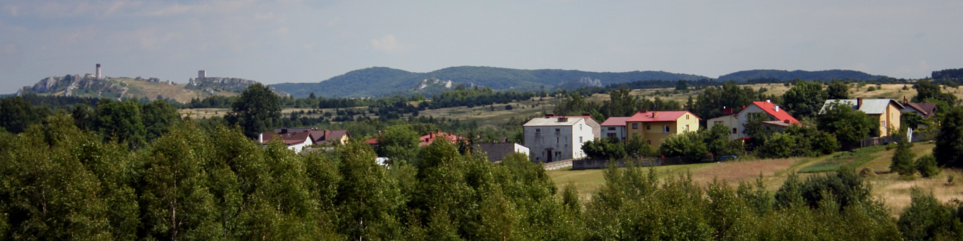 Fragment miejscowości Kusięta, gm. Olsztyn, woj. śląskie. Po prawej widoczne ruiny zamku w Olsztynie